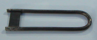 Taille-crayon "guillotine" - Objet personnel - Photo prise par moi même - LessayCatus 19:45, 3 December 2006 (UTC)